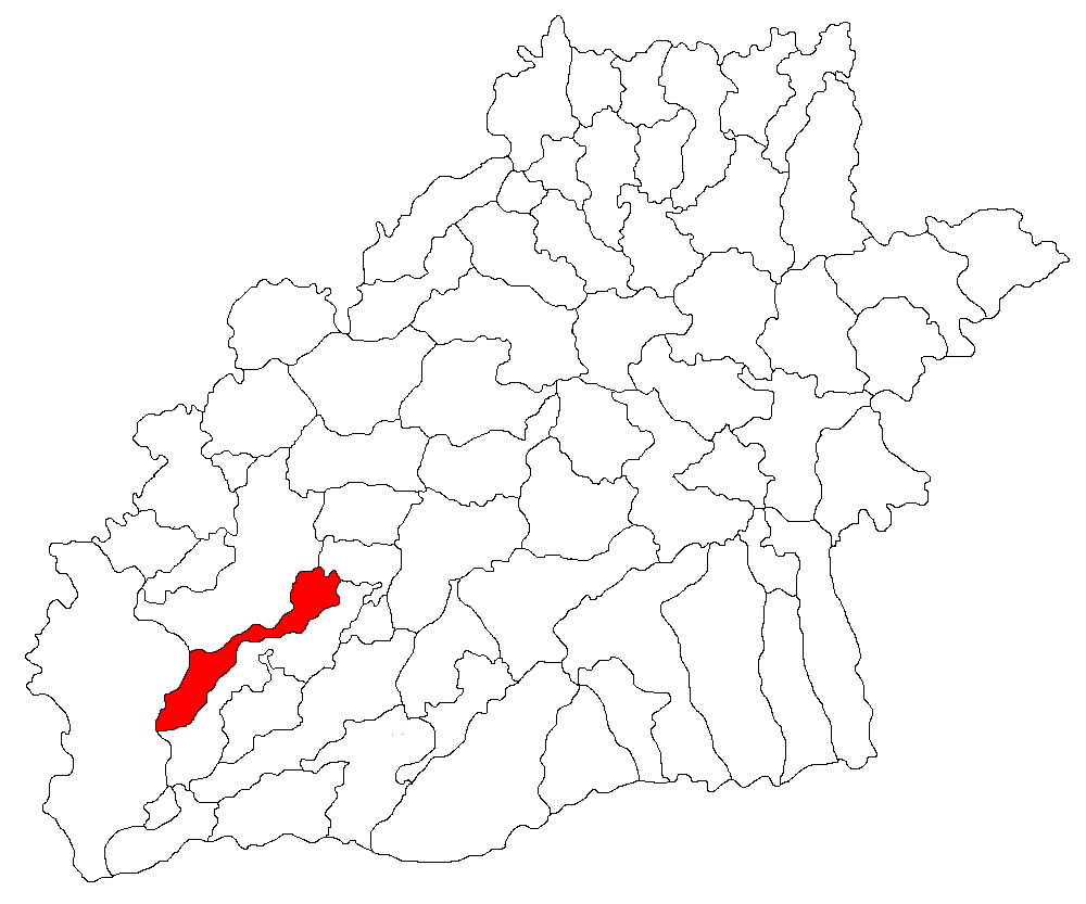 Categorie:Hărţi ale judeţului Sibiu